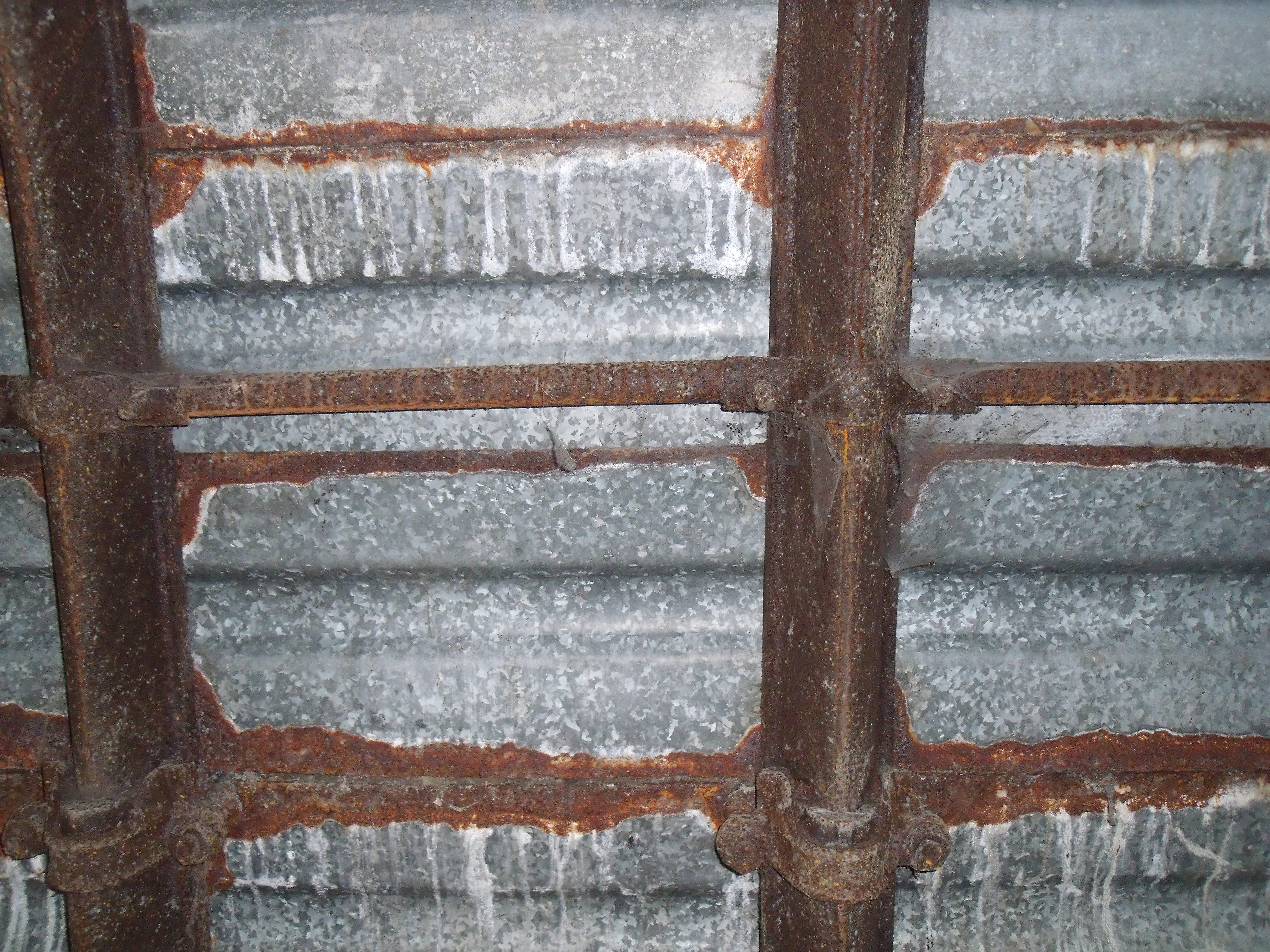 Verzug mit Verzugsblechen beim Gleitbogenausbau